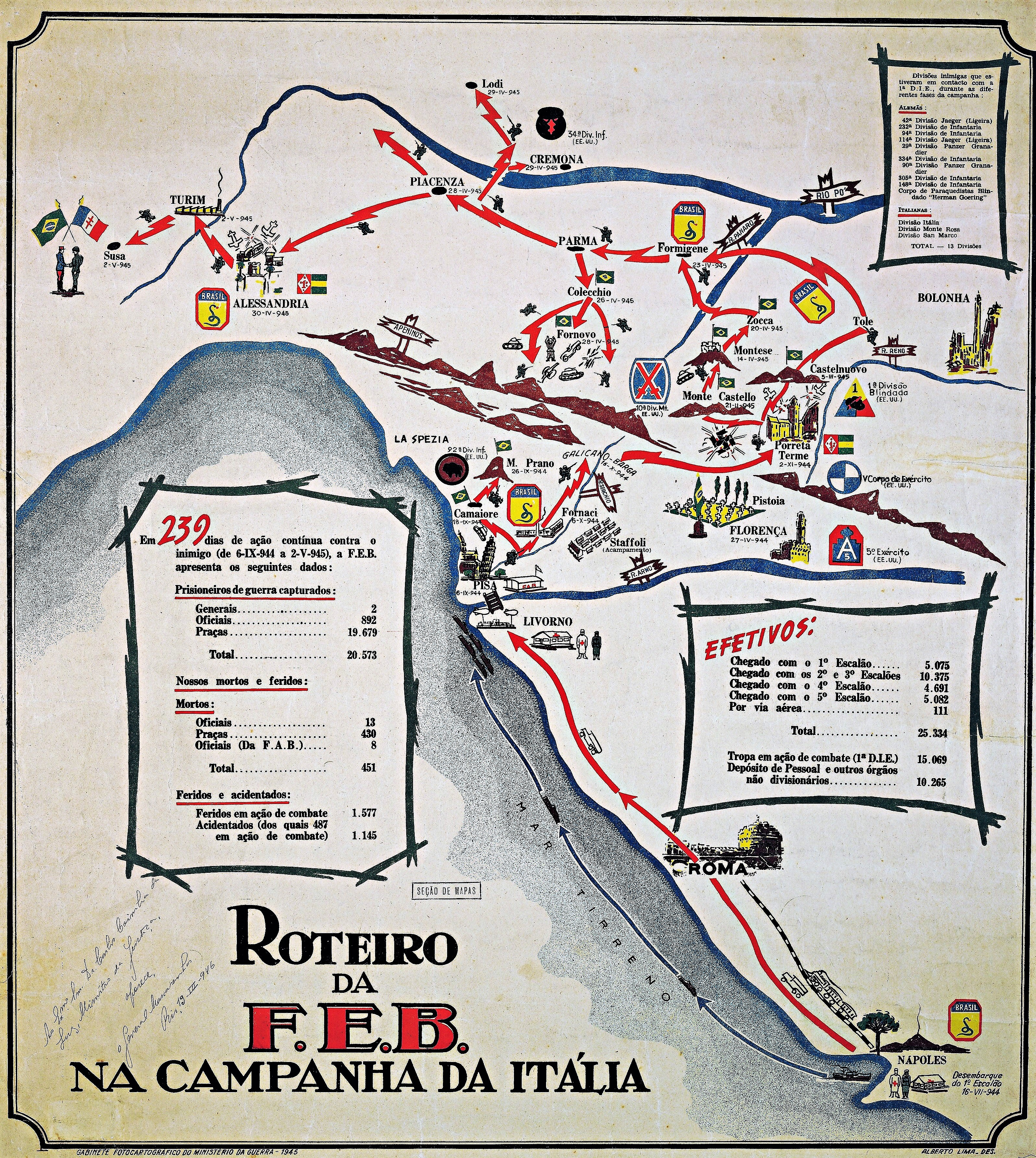 Fundo:Ministério da Justiça e Negócios Interiores.